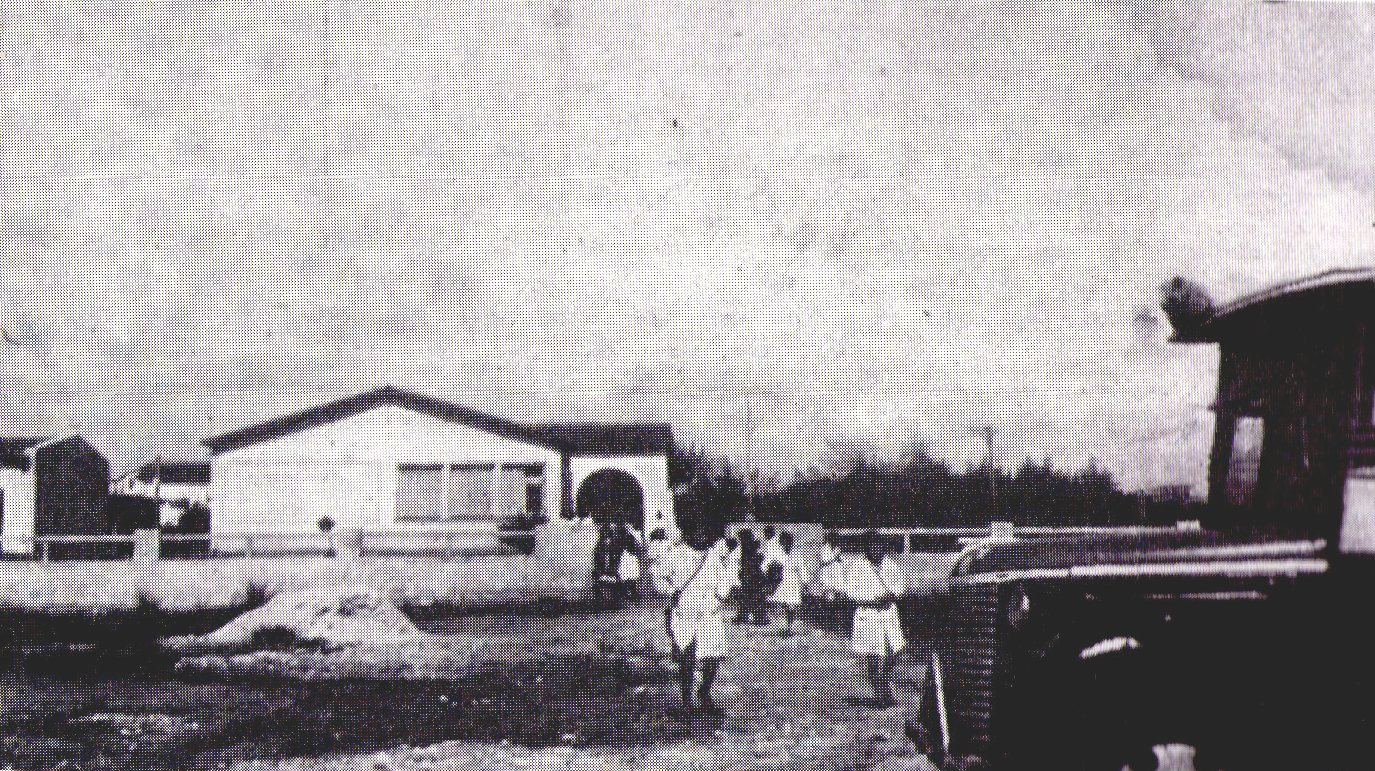 Escuela Nº7 año 1995